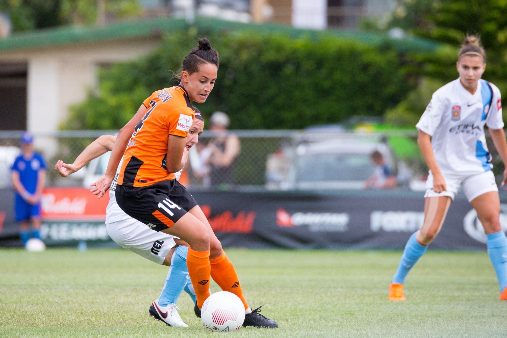 Summer O'Brien